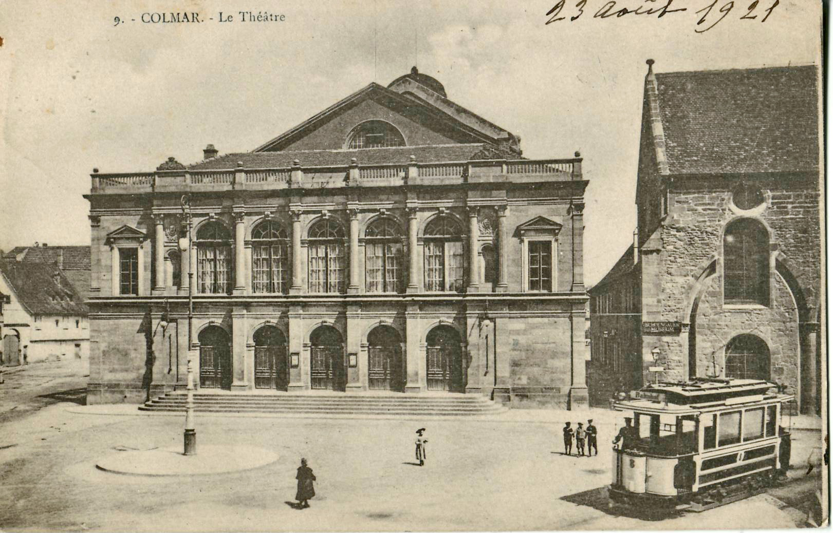 Carte postale ancienne éditée par Bergeret, n°9 : Colmar - Le Théâtre